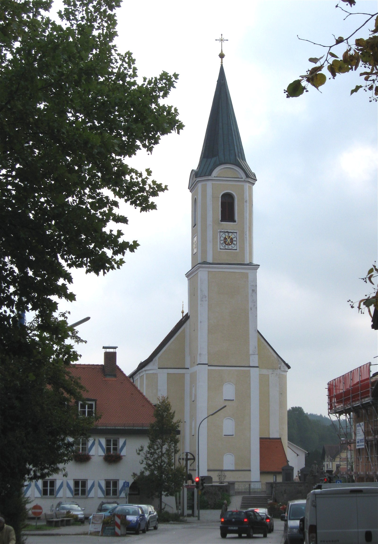 Pfarrkirche St. Johann Baptist, Glonn, Landkreis Ebersberg